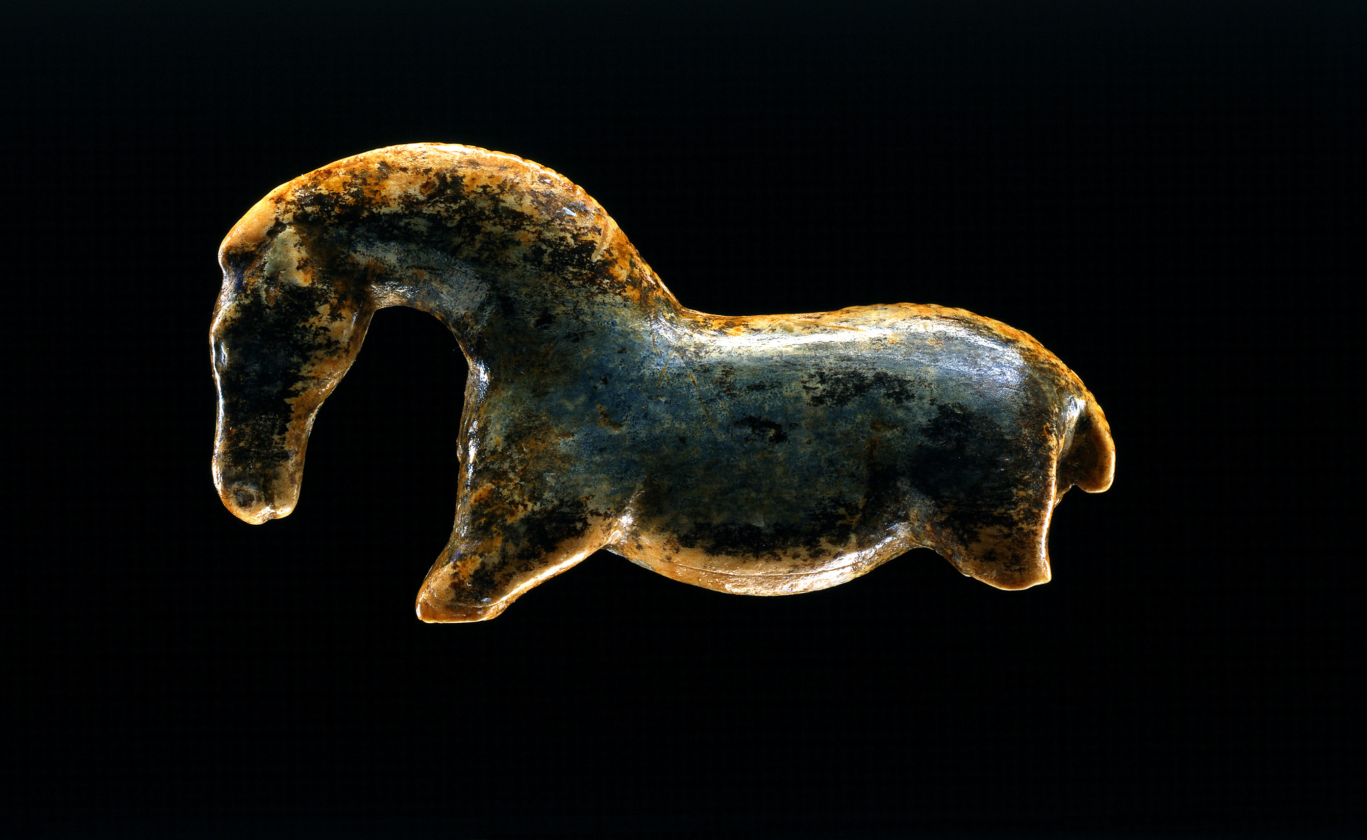 Wildpferdle Vogelherdhöhle